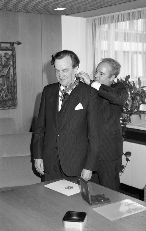 20.4.1989 Parlamentarischer Staatssekretär Dr. Wolfgang von Geldern, überreicht das Große Verdienstkreuz des Verdienstordens der Bundesrepublik Deutschland an den langjährigen früheren Vorsitzenden der Arbeitsgemeinschaft Deutscher Waldbesitzerverbände, Philipp Freiherr von Boeselager, - im Bundesministerium für Ernährung, Landwirtschaft und Forsten